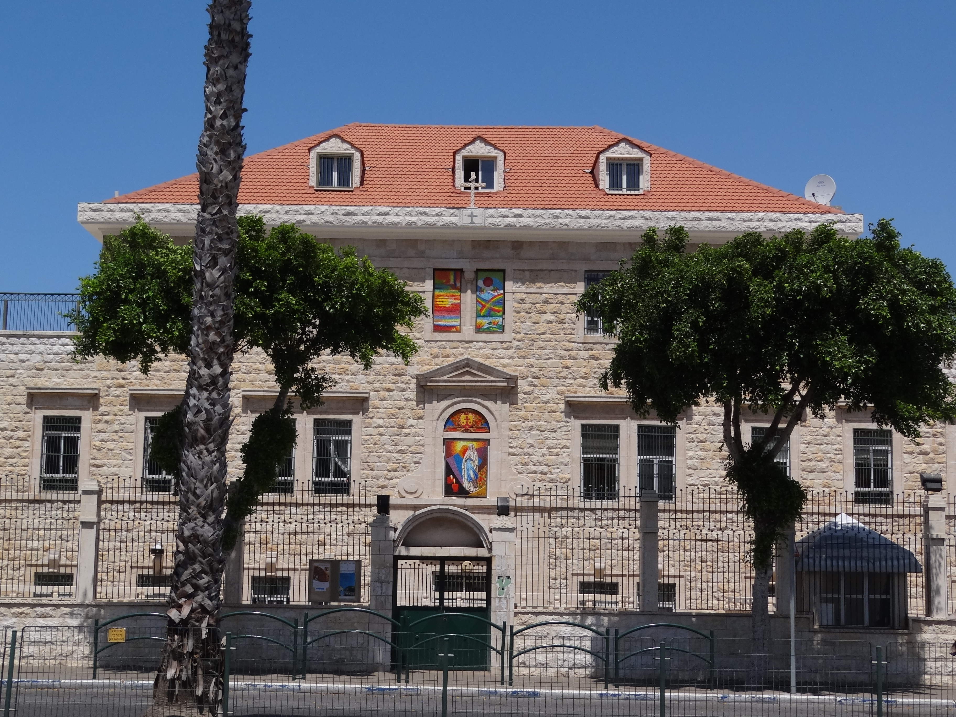 Saint Joseph's Latin Parish, Haifa Israel סיינט גוזף, הכנסייה הלטינית, שוכנת בחיפה בשדרות המגינים. מבני הקהילה כוללים ברת בית הספר כרמל בשדרות המגינים 76, מבנה הכנסייה בשדרות המגינים 78, ומבנה הקהילה בשדרות המגינים 80 בית ספר כרמל